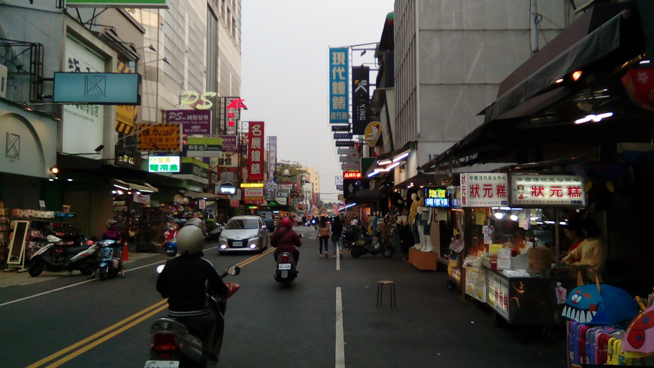 同上